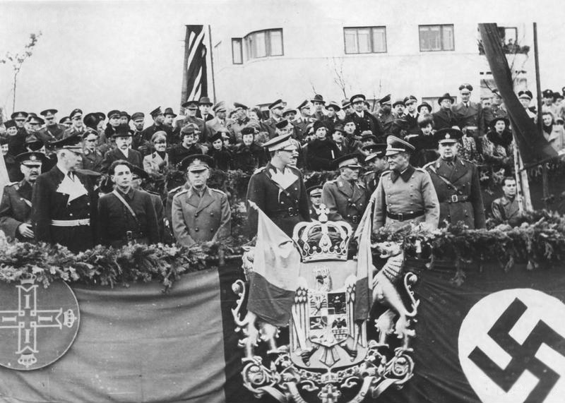 Palco del desfile en celebración de la firma por Rumania del Pacto Tripartito. Entre otros el dirigente de la Guardia de Hierro, Horia Sima (tercero por la izquierda), el caudillo del país, Ion Antonescu (cuarto) y el monarca rumano, Miguel I (quinto).